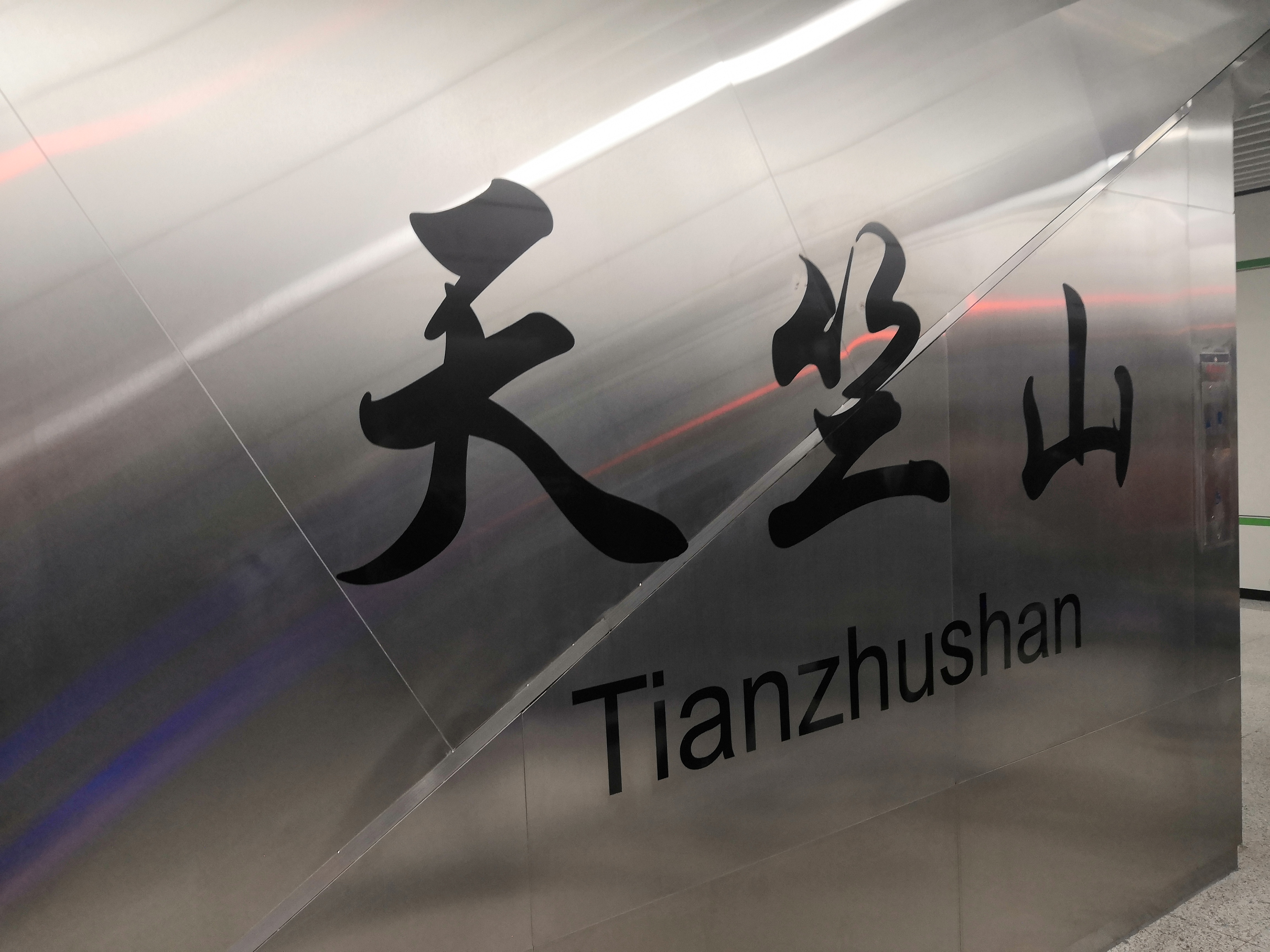 天竺山站的标志